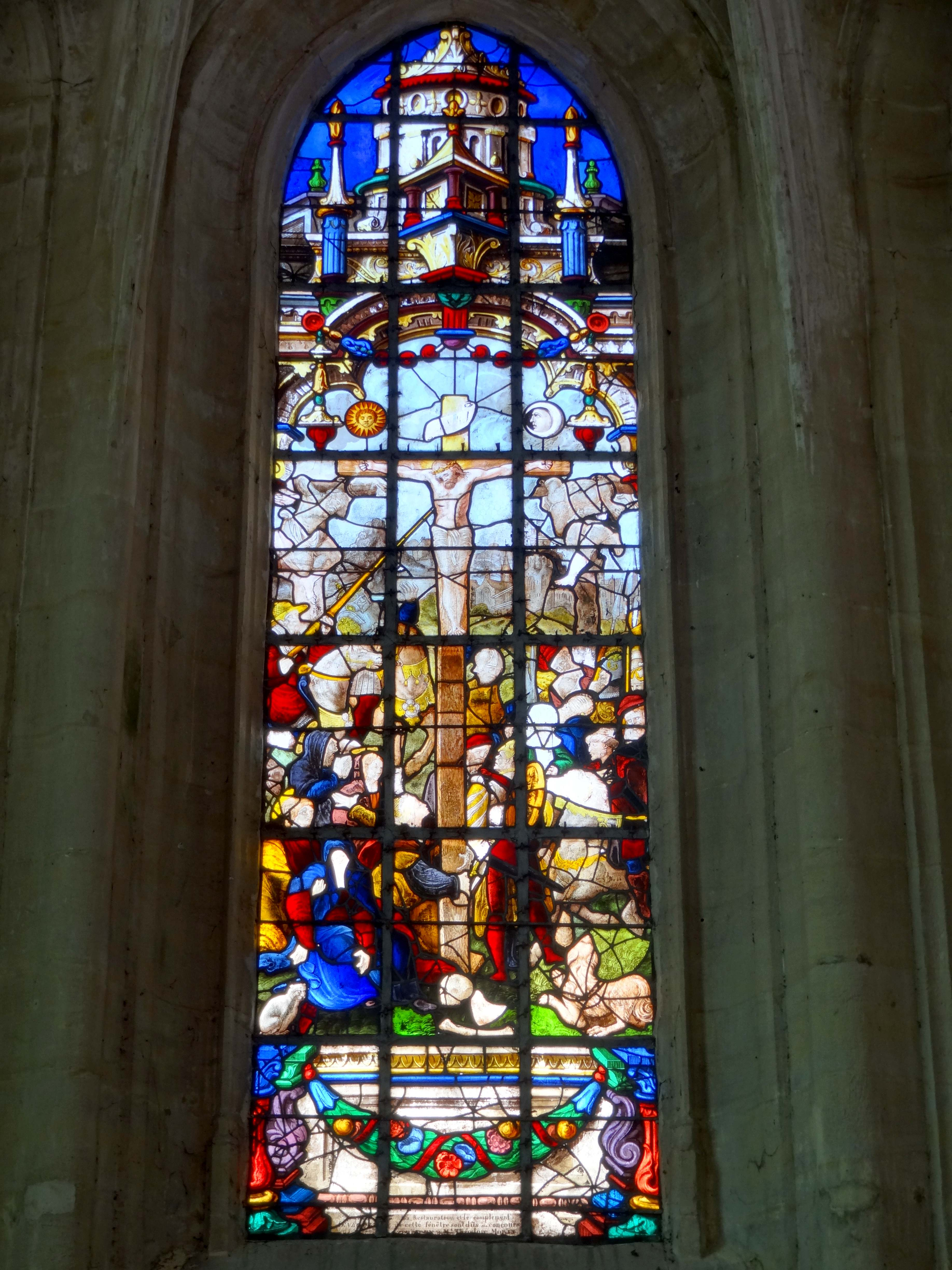 Chœur, verrière n° 0 - Crucifixion.